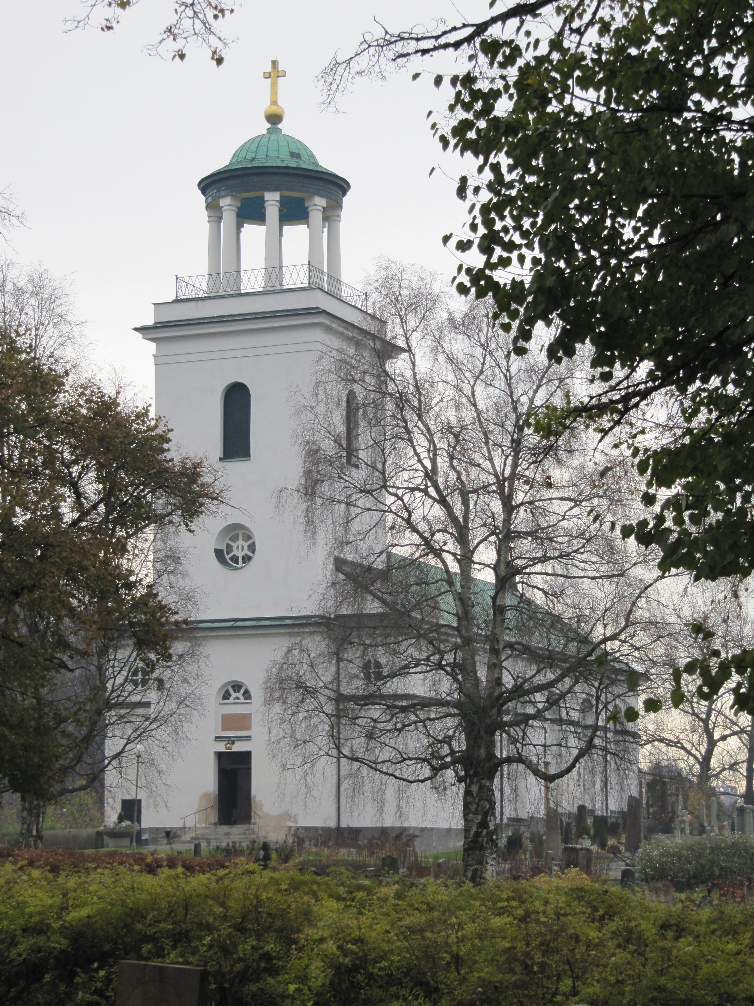 Timrå kyrka